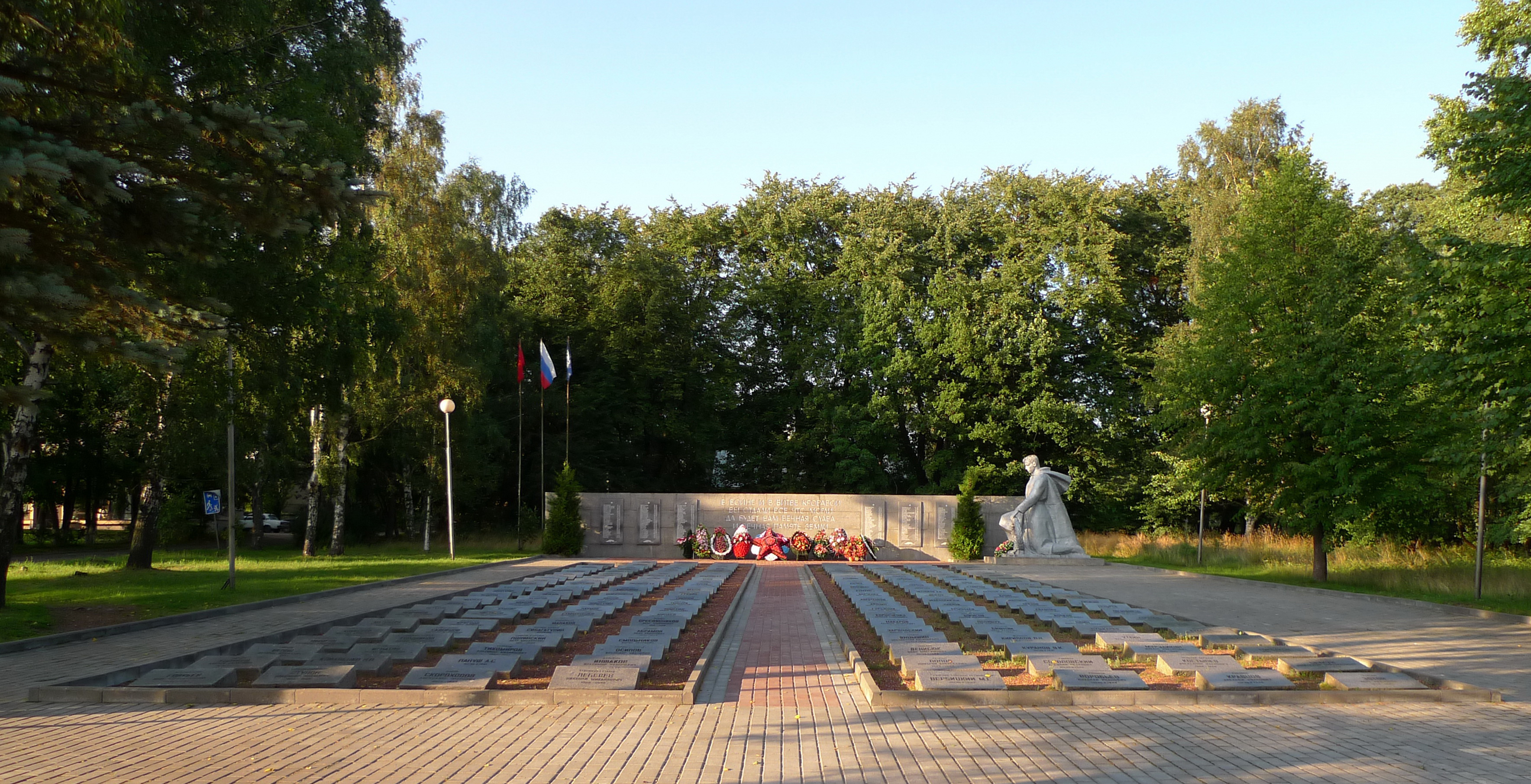 Мемориал жертвам Великой отечественной войны в Приморске